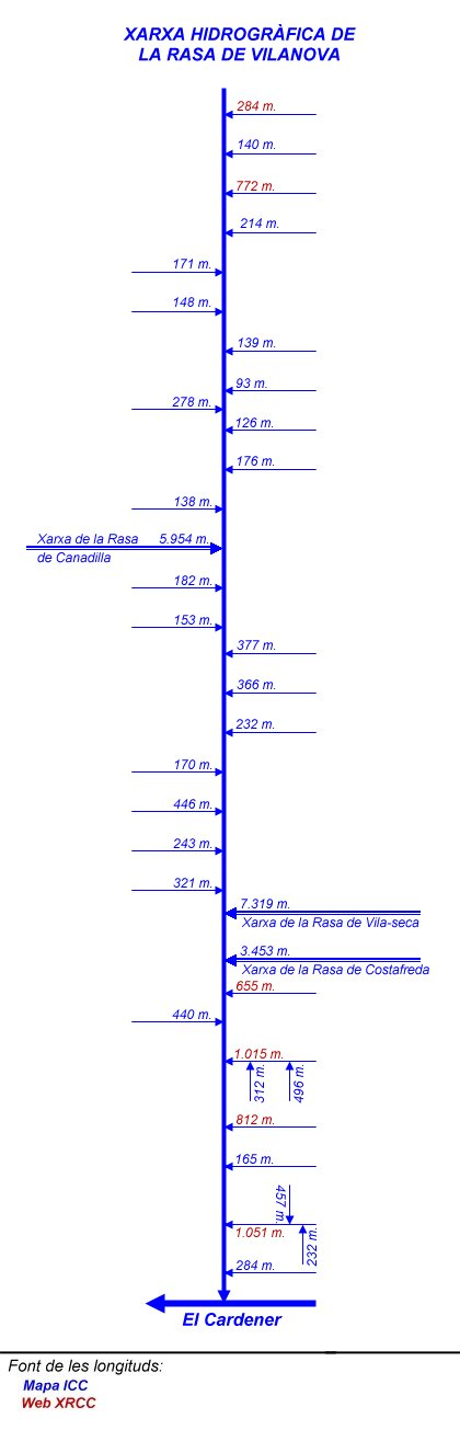 Mapa esquemàtic de la xarxa hidrogràfica de la Rasa de Vilanova, a Lladurs (Solsonès).